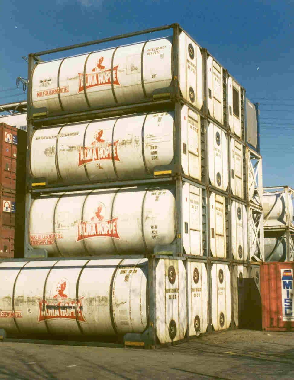 Porthole Tankcontainer (2272)